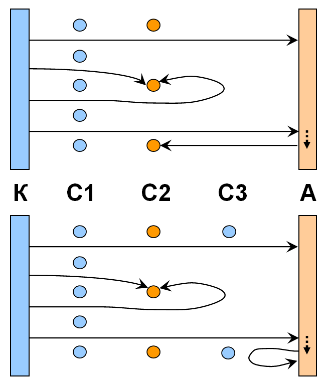 Возможные пути движения электронов в тетроде (вверху) и в пентоде (внизу) в режиме возврата: прямой пролёт на анод, прямой перехват экраном, возврат на экран, вторичная эмиссия. В тетроде вторичный электроны притягиваются экраном, в пентоде они падают обратно в анод. внимание! прямые "траектории" - упрощение. В действительности они кривые из-за неоднородности полей.